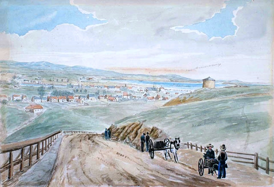 Panorama de Saint-Roch, actuelle Côte Salaberry, début du 19e siècle James Pattison Cockburn, BAC, Négatif de copie C-040021